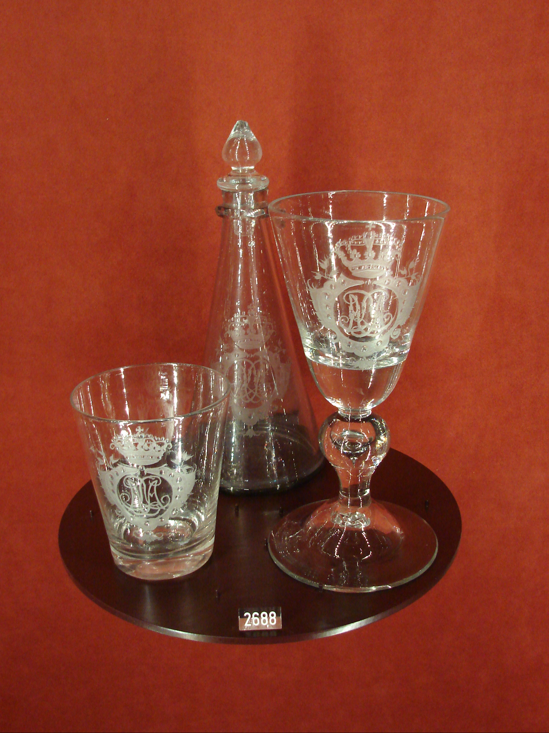 Karaffel, vin- og vandglas fra Nøstetangen. Monogrammet LA betegner prinsesse Louise Augusta (1771 – 1843). Rosenborg slot, København